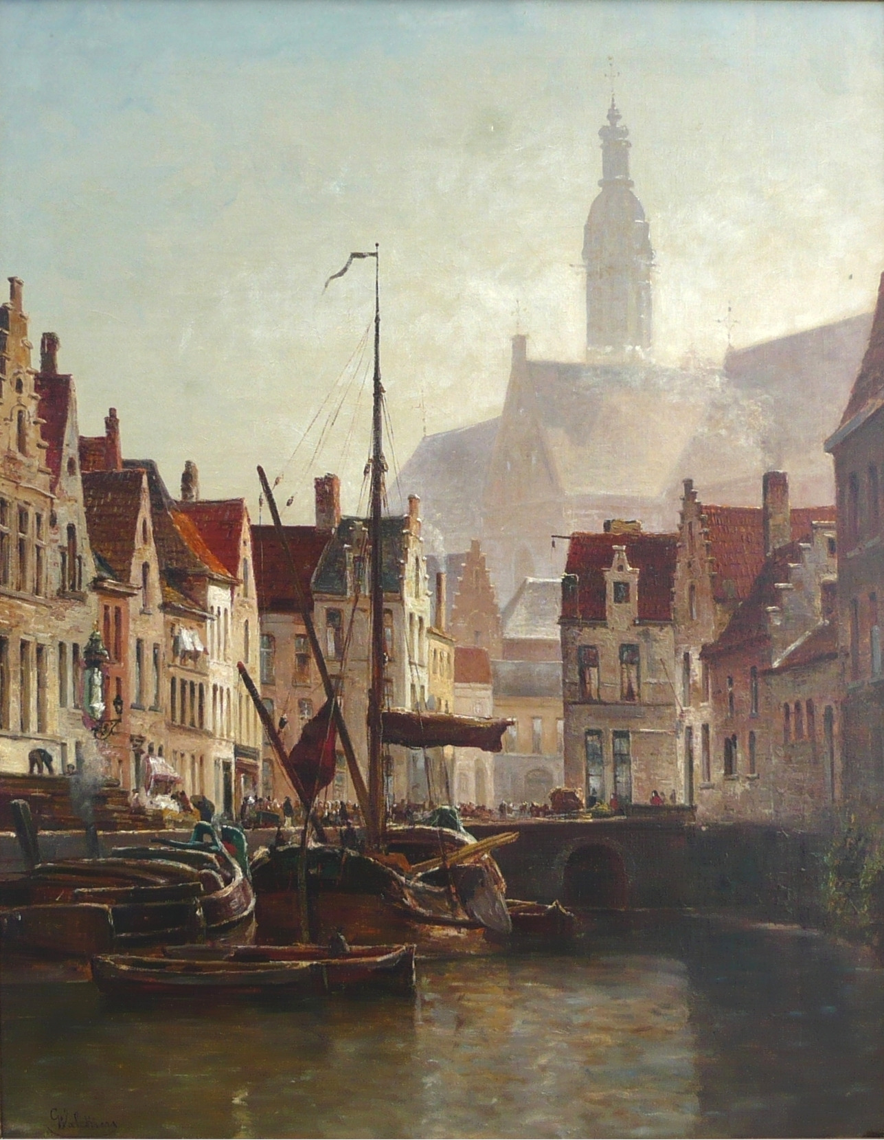 Koolvliet in Antwerpen nu Koolkaai, bij Sint Pauluskerk